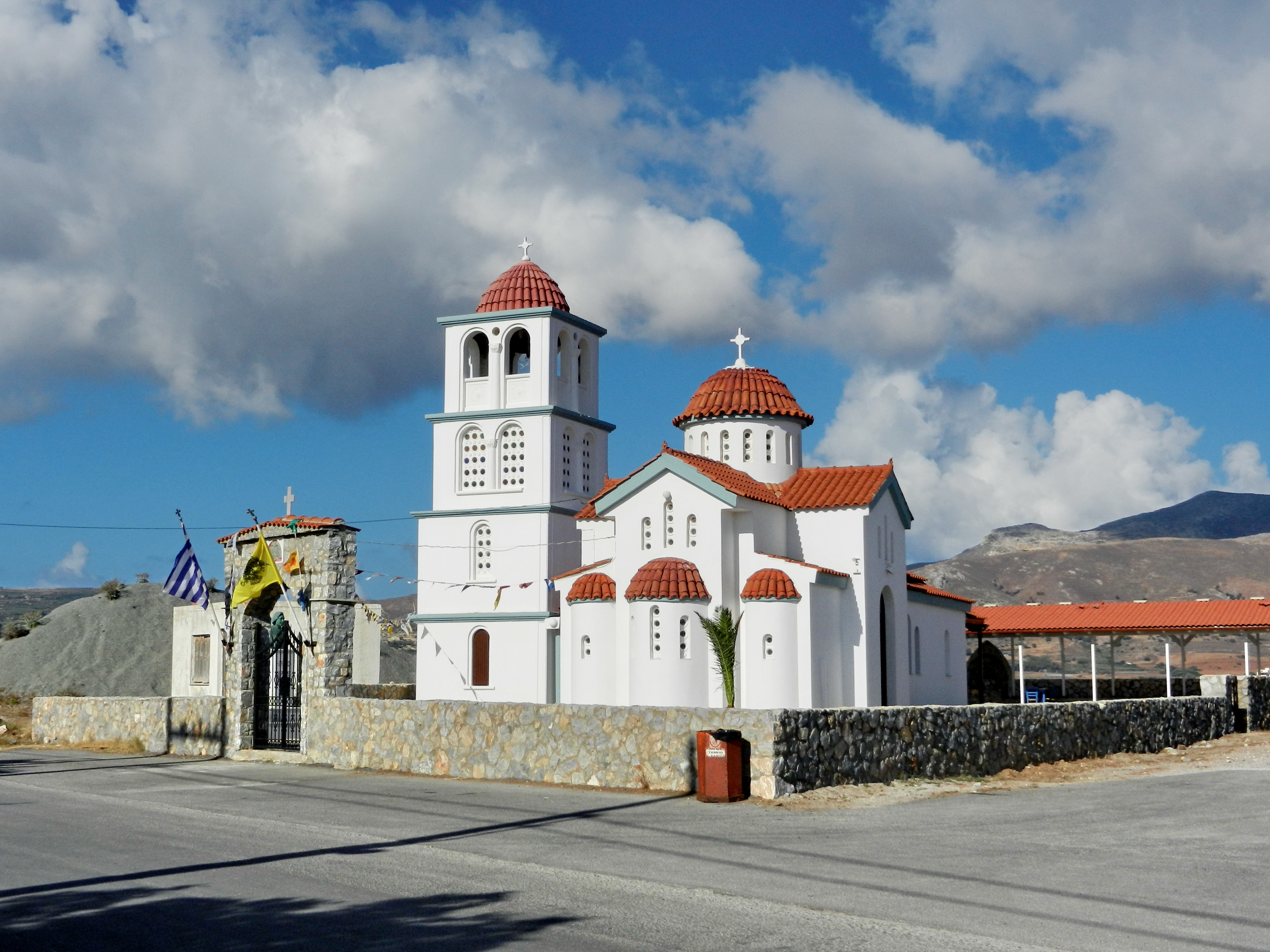 Kissamos